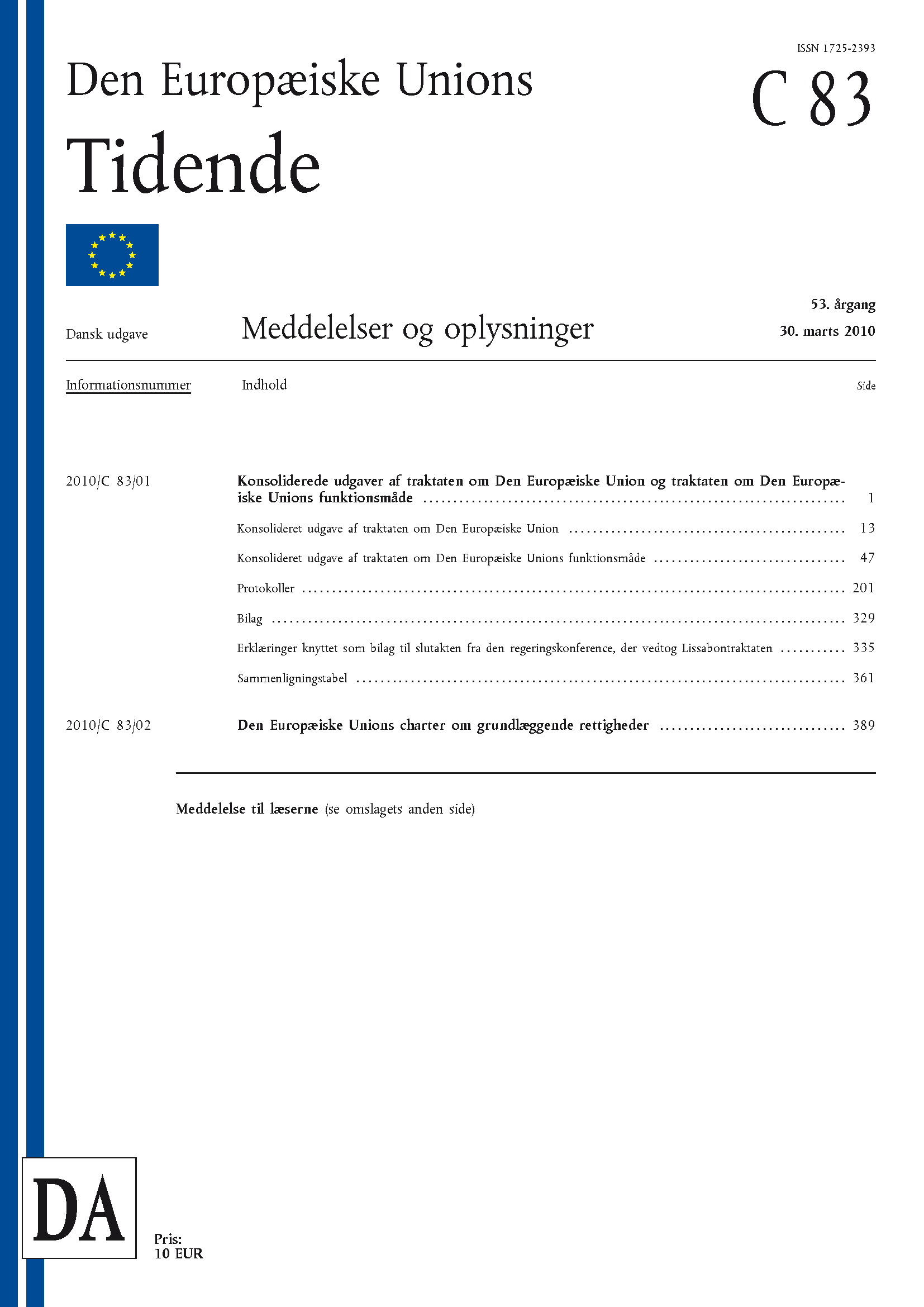 Eksempel på en side fra EUT